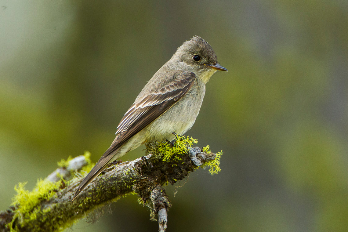 Western Wood-Peewee - Sisters - Oregon_S4E1878